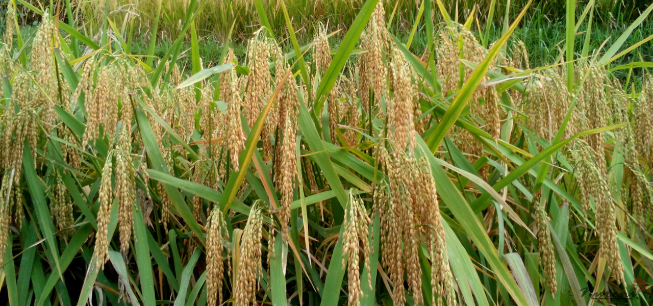 Padi Sawah Nyalindung Pasirhuni Desa Cikadu Menguning